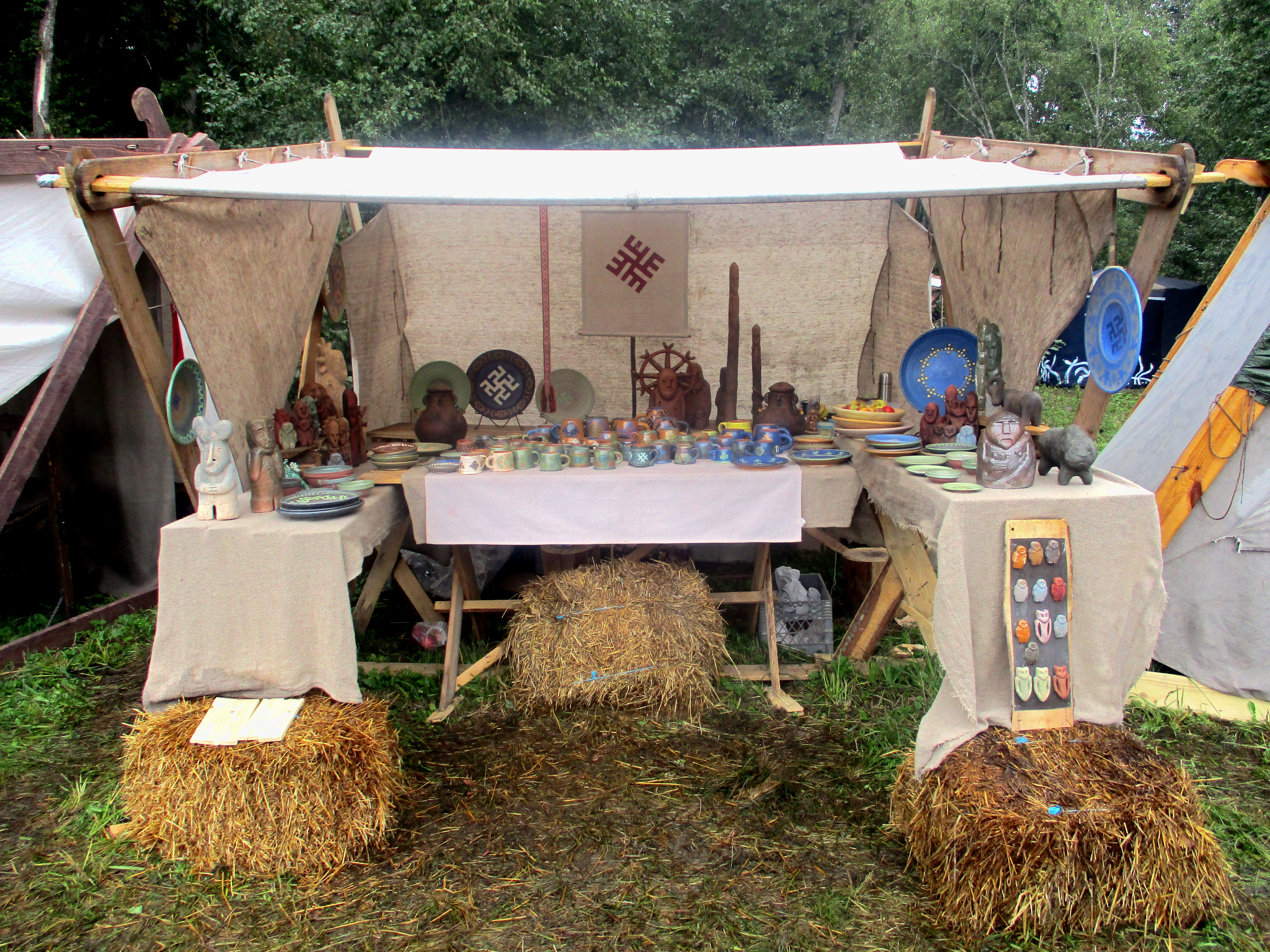 Mėnuo Juodaragio XXI Baltic Crossroads.